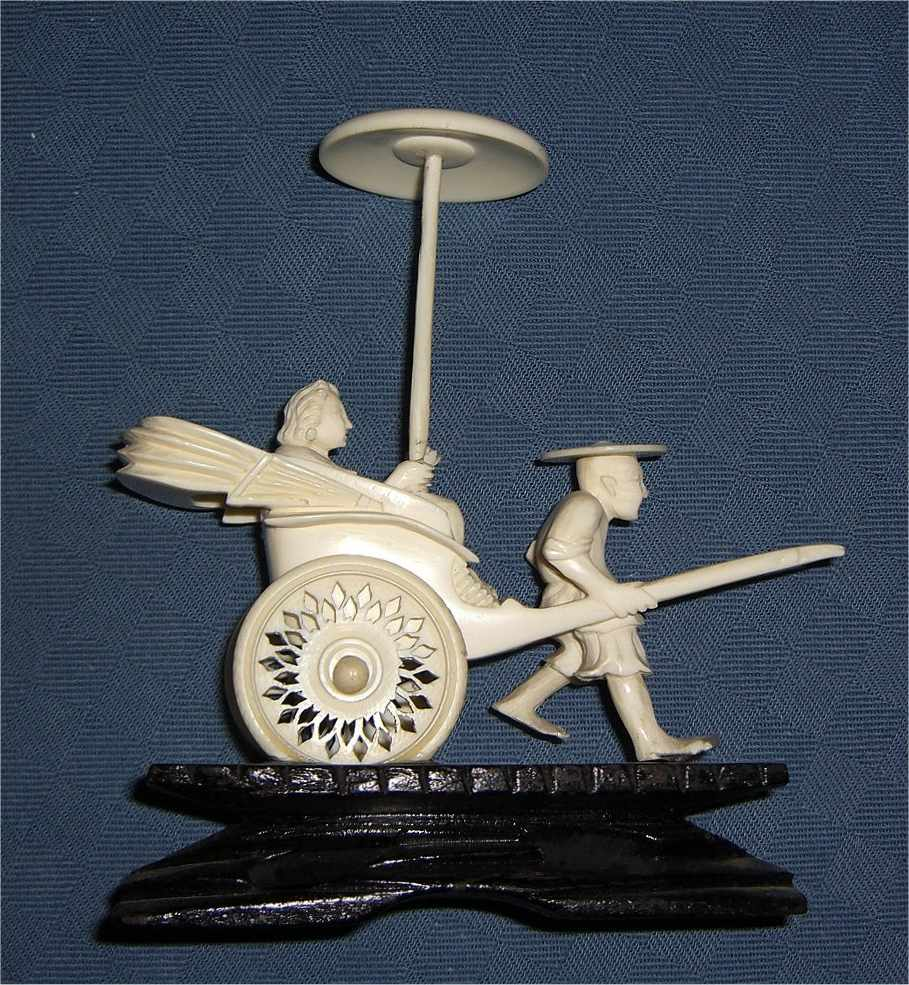 Risciò in avorio artigianato cinese di Hong Kong